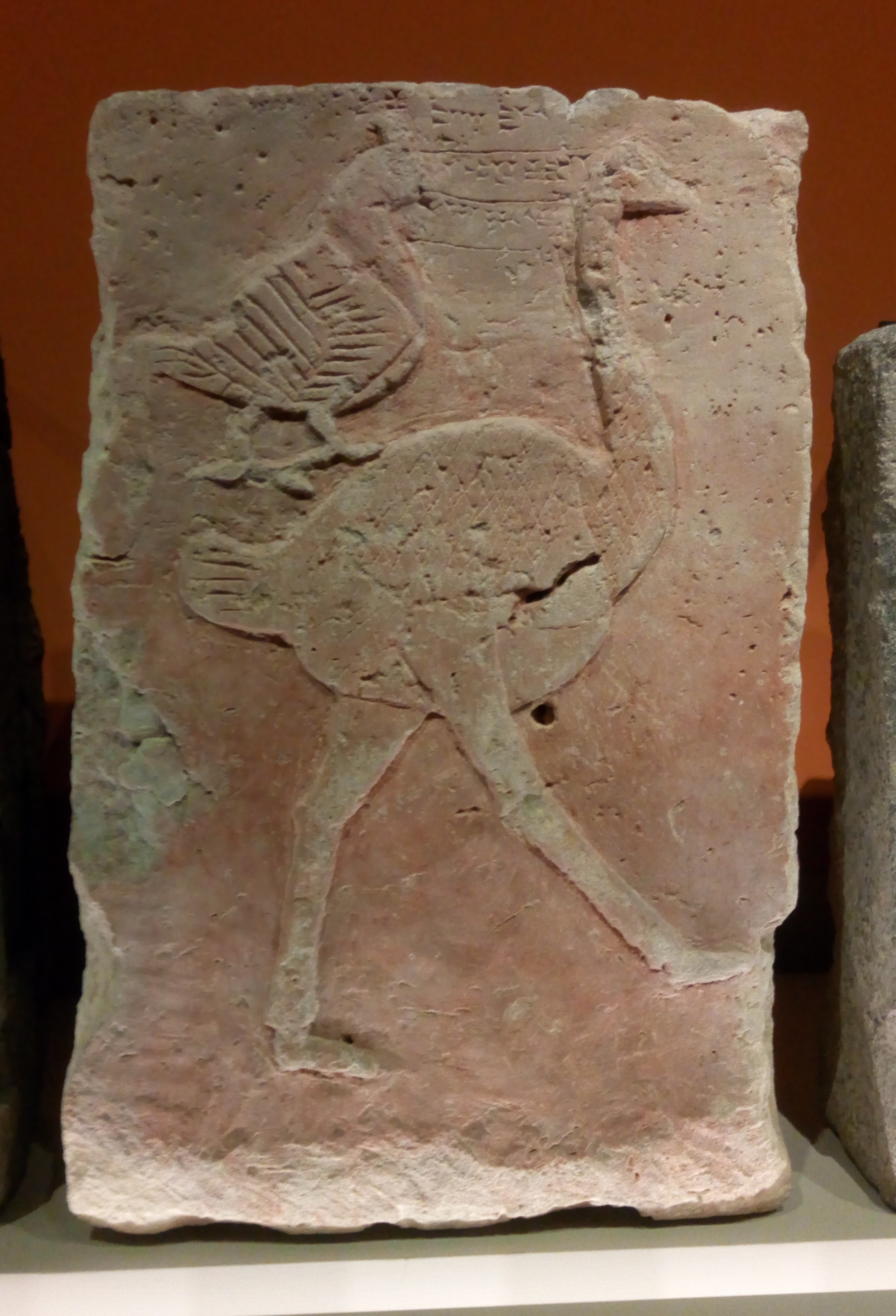 Orthostate en calcaire peint en rouge représentant une autruche avec une perdrix sur son dos. Disposé à l'origine sur la façade du "temple-palais" du roi Kapara de Guzana, site archéologique de Tell Halaf. IXe s. av. J.-C. Sur orthostate en calcaire. Exposé au Musée du Louvre en 2019 dans le cadre de l'exposition "Royaumes oubliés". Collections du Pergamon Museum de Berlin.